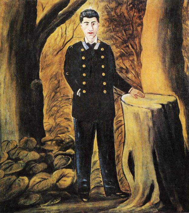 Илья Зданевич